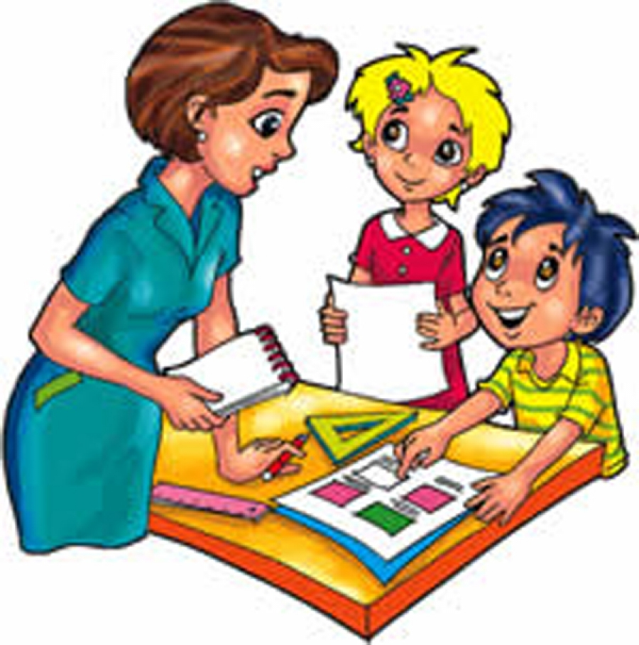 Promoveer la Participación Colaborativa